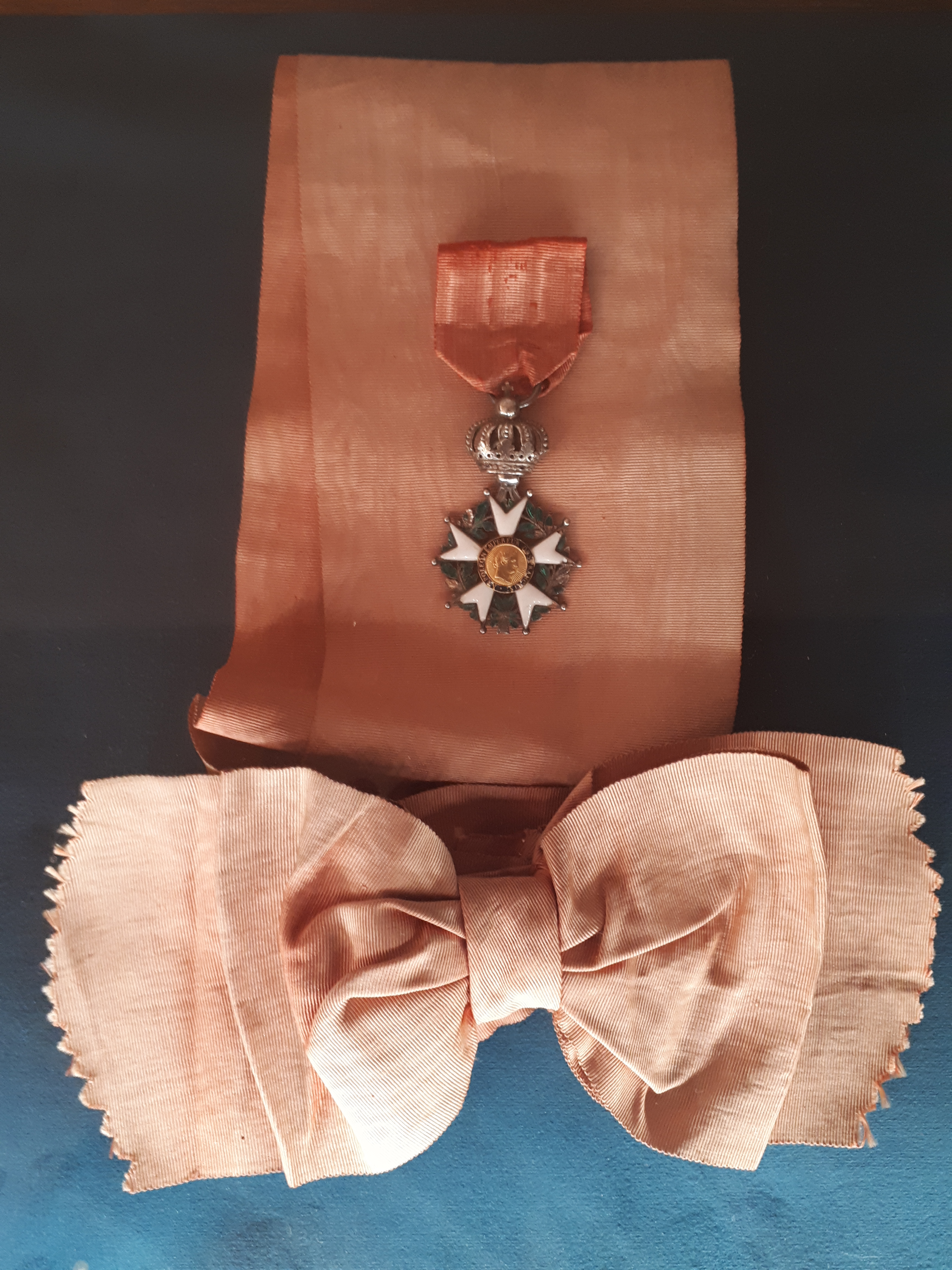 Écharpe de Grand' Croix et etoile de la Légion d'Honneur du Général Oudinot